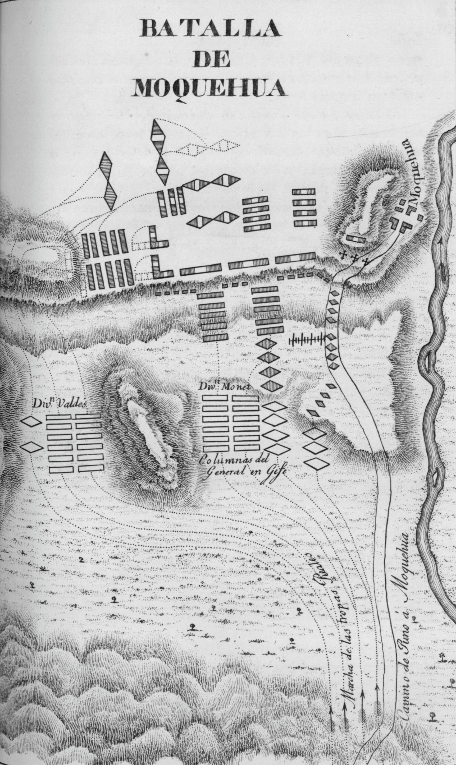 Croquis de la batalla de Moquegua